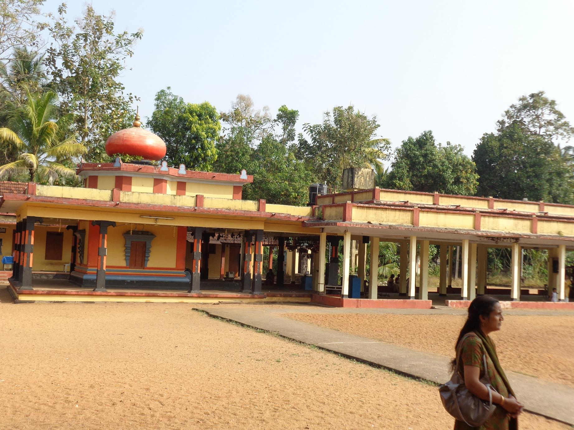 തിരുവൻ വണ്ടൂർ ക്ഷേത്രത്തിലെ ഗോശാലകൃഷ്ണന്റെ ക്ഷേത്രം